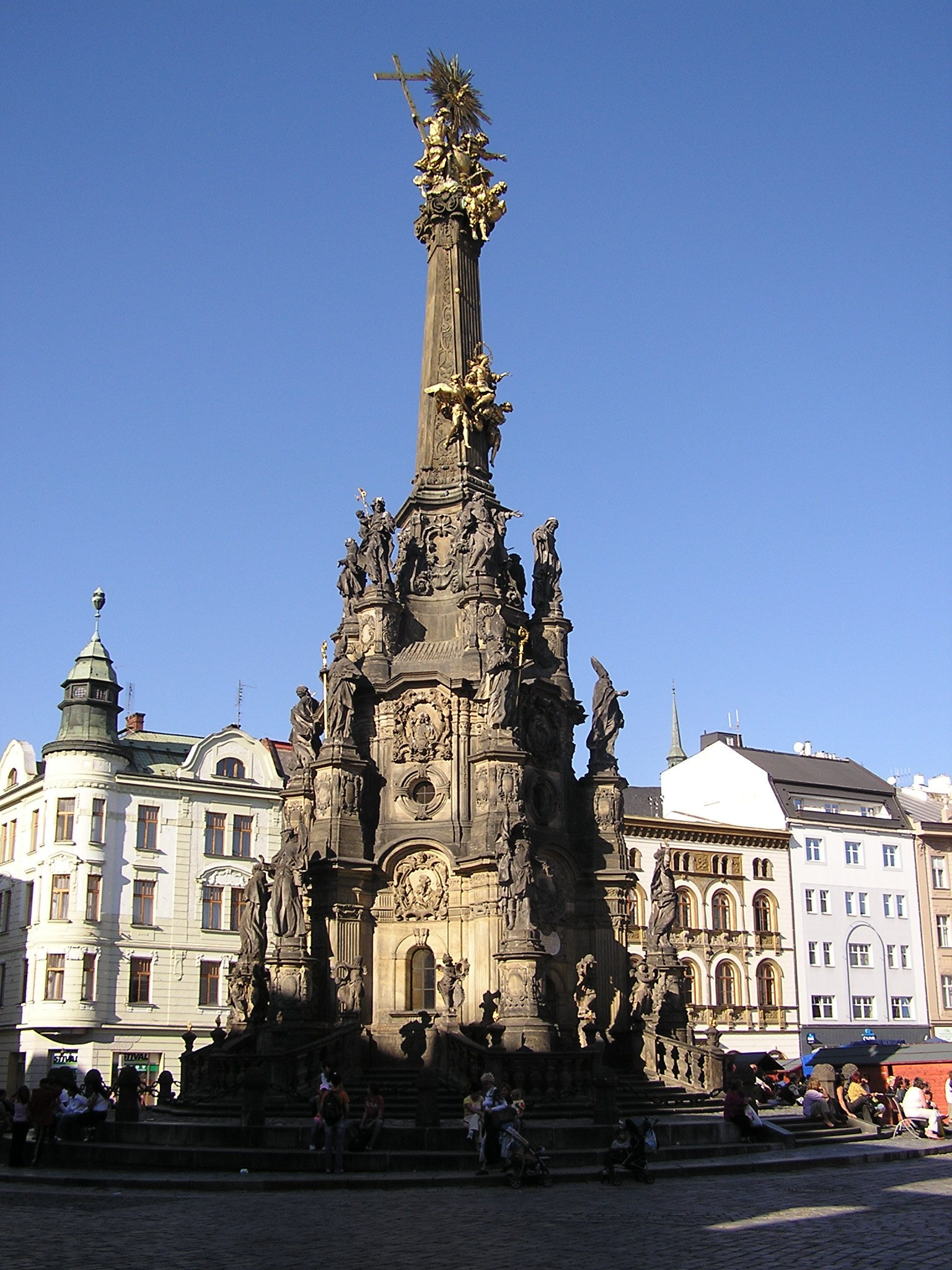 Sloup v Olomouci